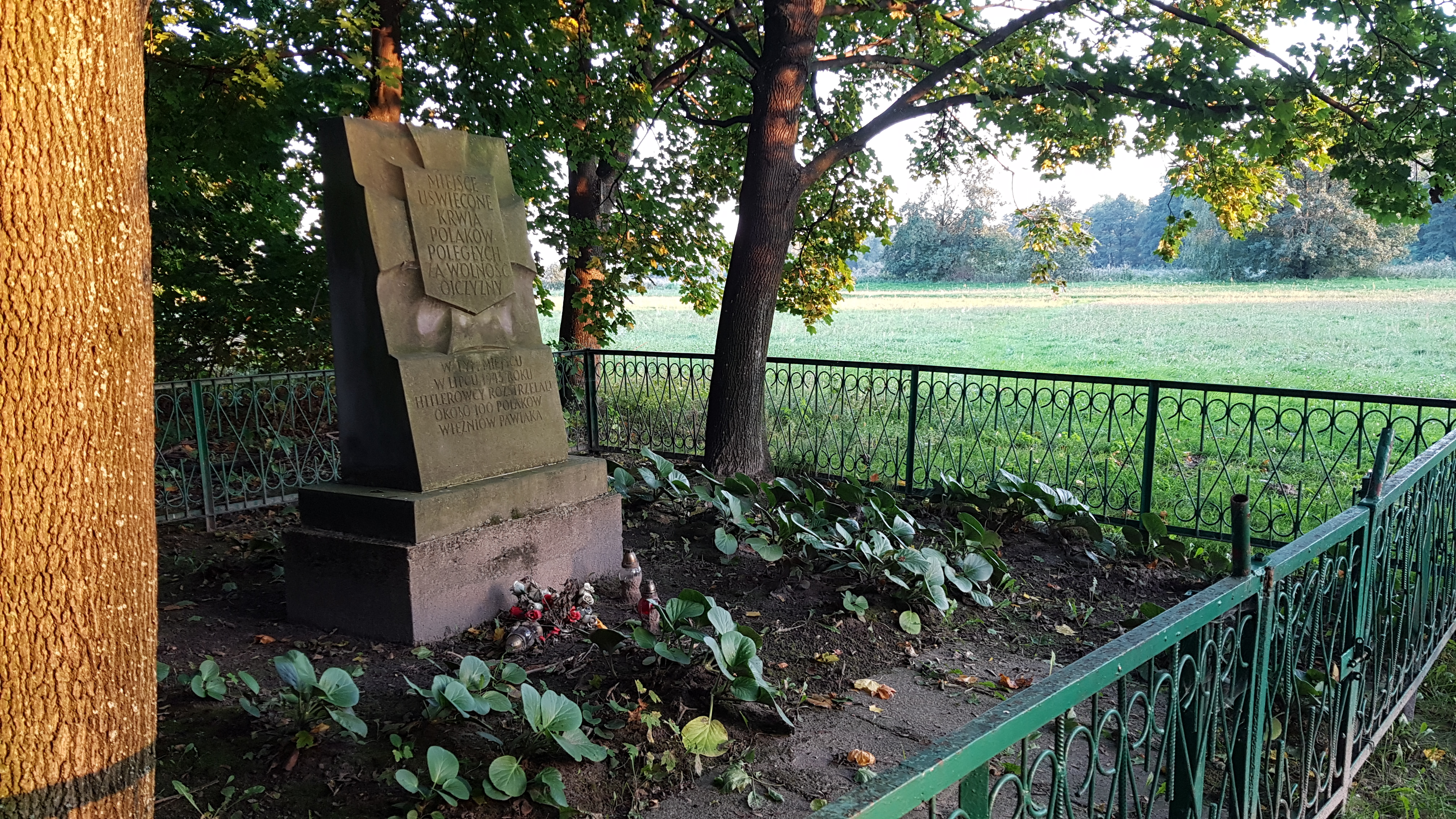 Miejsce egzekucji przez Niemców około 100 więźniów Pawiaka w lipcu 1943 roku w Raszynie (teren obecnego rezerwatu przyrody Stawy Raszyńskie)